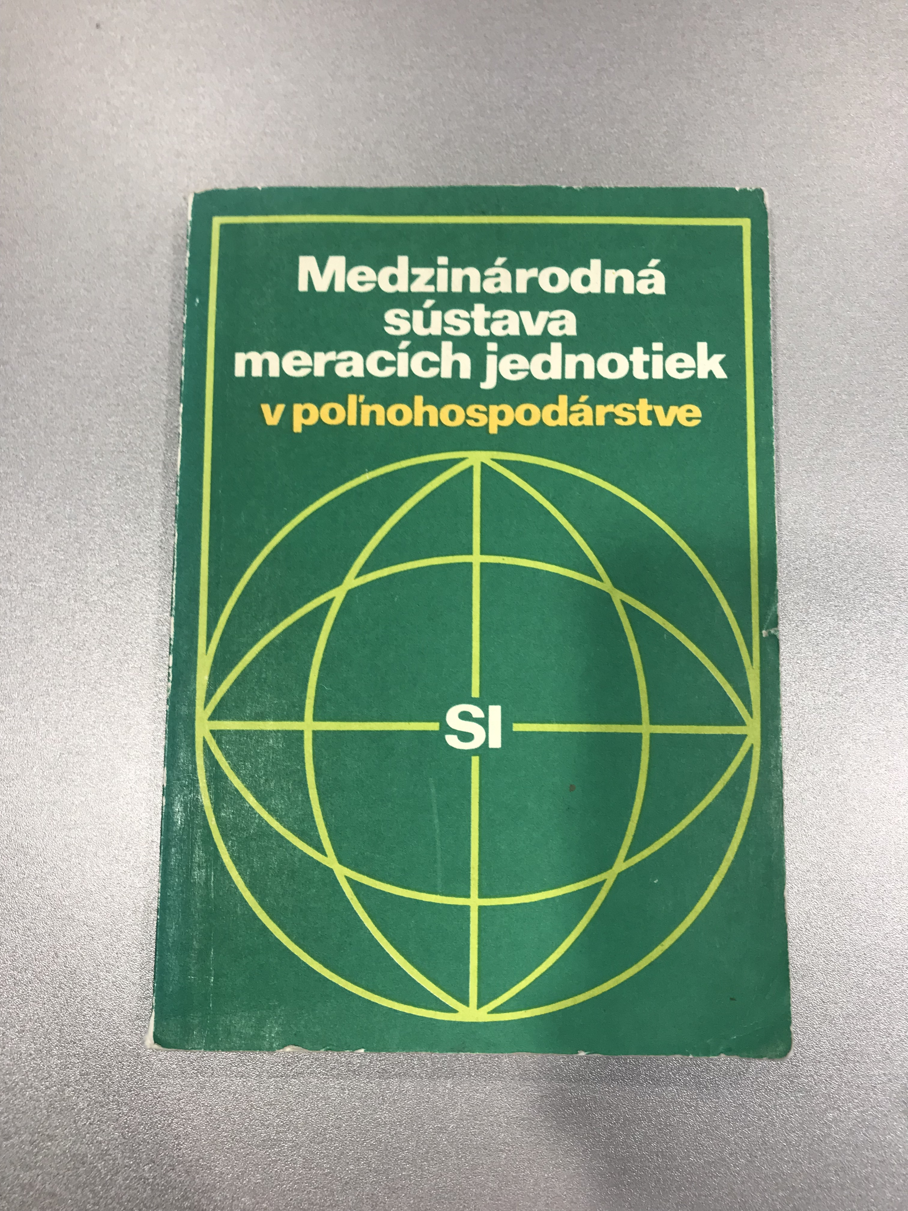 Medzinárodná sústava meracích jednotiek v poľnohospodárstve